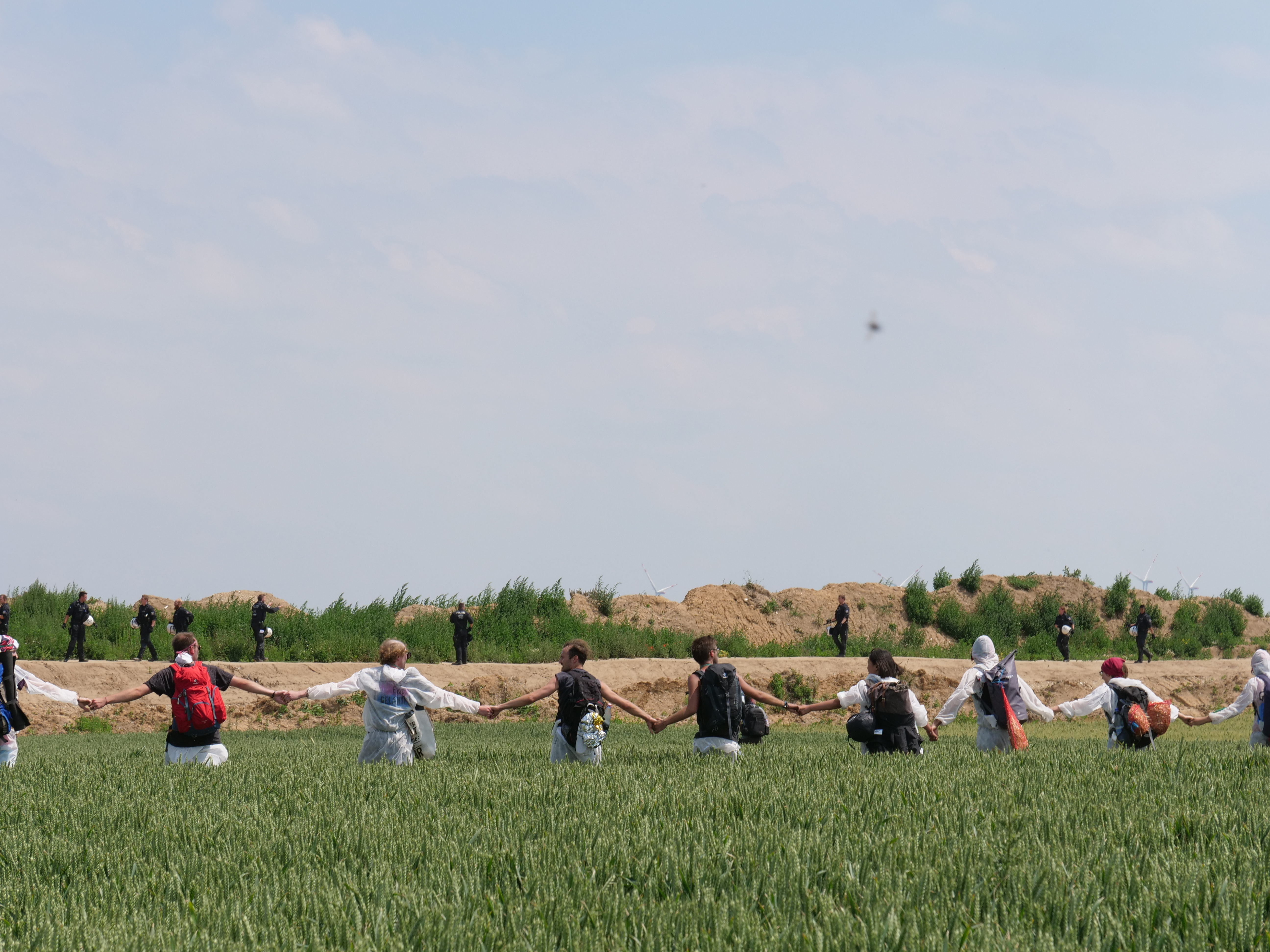 Ausbruch aus der Demonstration und Laufen über die Felder bis an die Kante des Tagebaus Garzweiler vom Roten Finger von Ende Gelände am 22. Juni 2019.